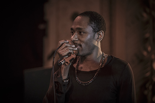 yasiin bey mos def 2015